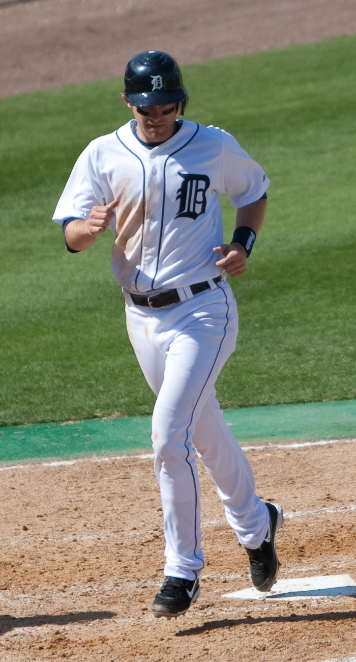 Adam Everett